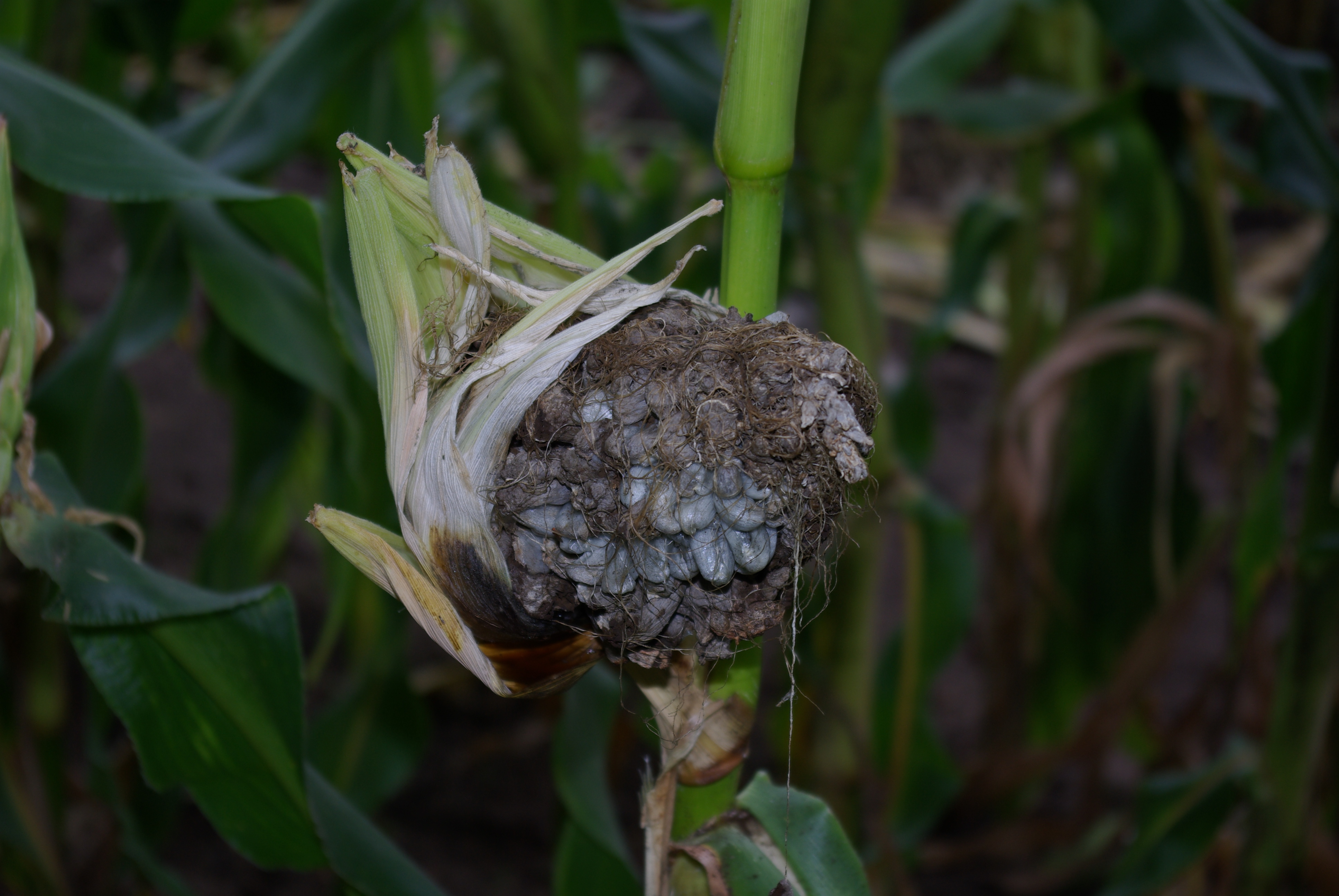 Vom Maisbeulenbrand befallener Maiskolben